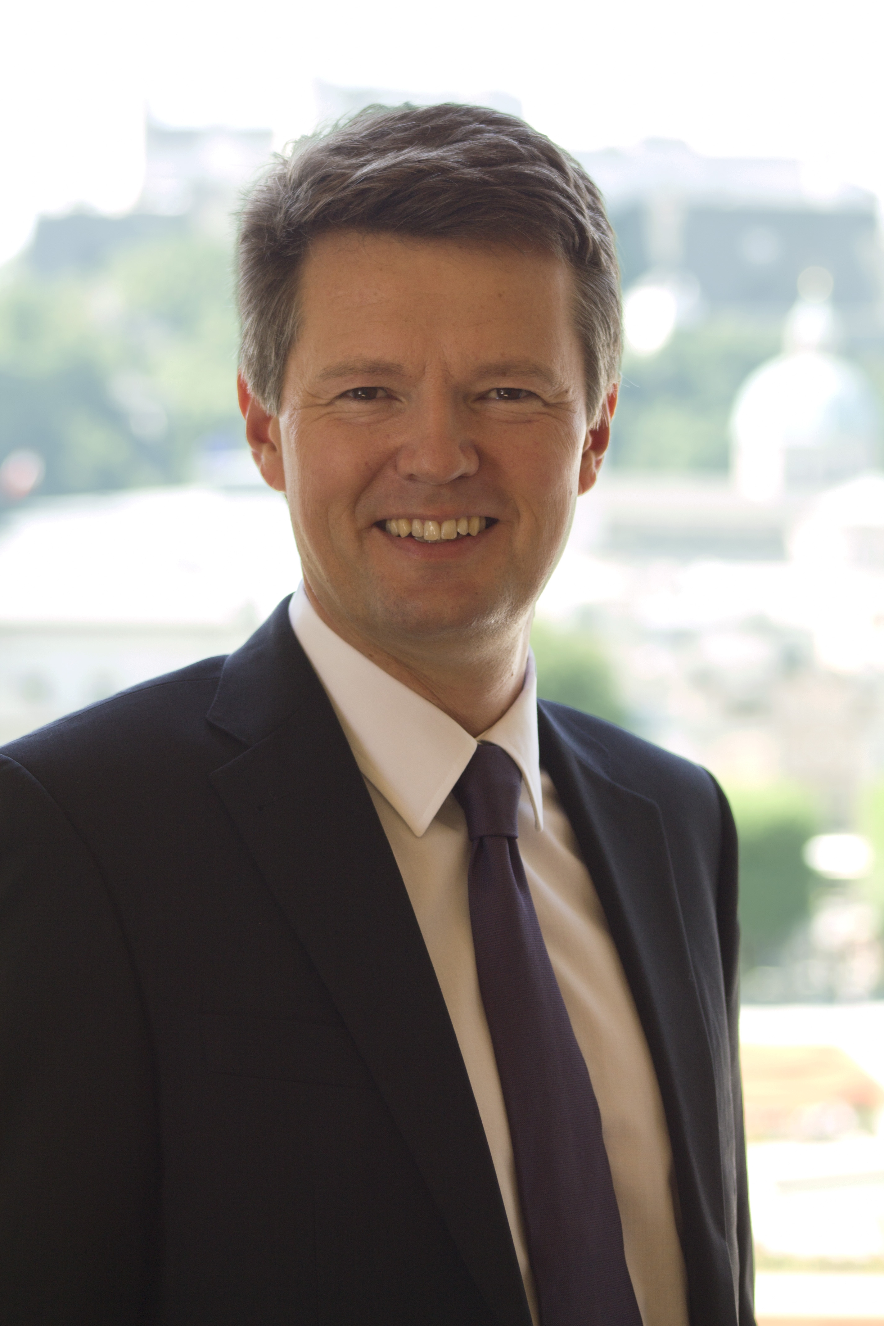 Martin Panosch 2013